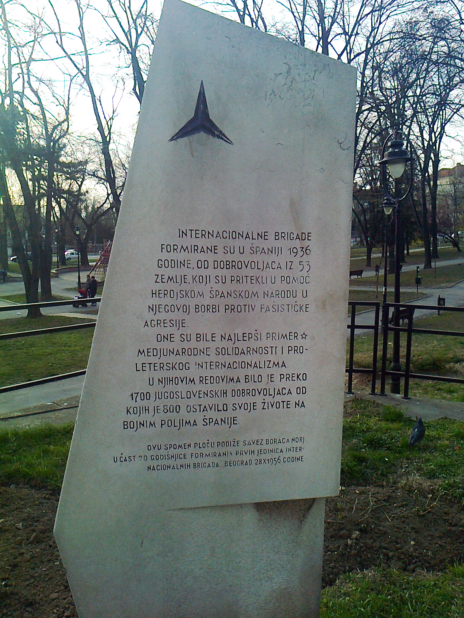 Spomenik Internacionalnim brigadama.